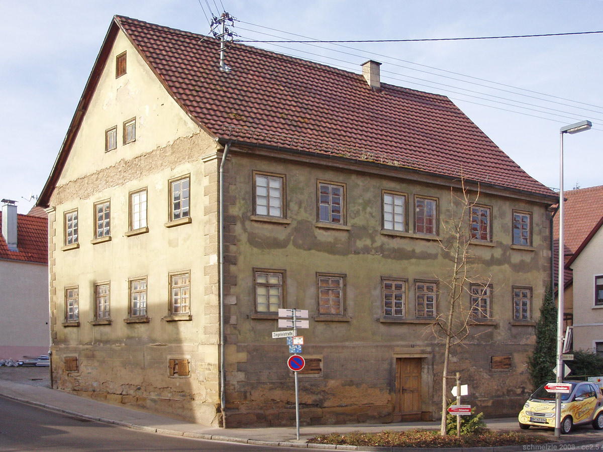 Historisches Gebäude Bonfelder Str.1 in Heilbronn-Biberach